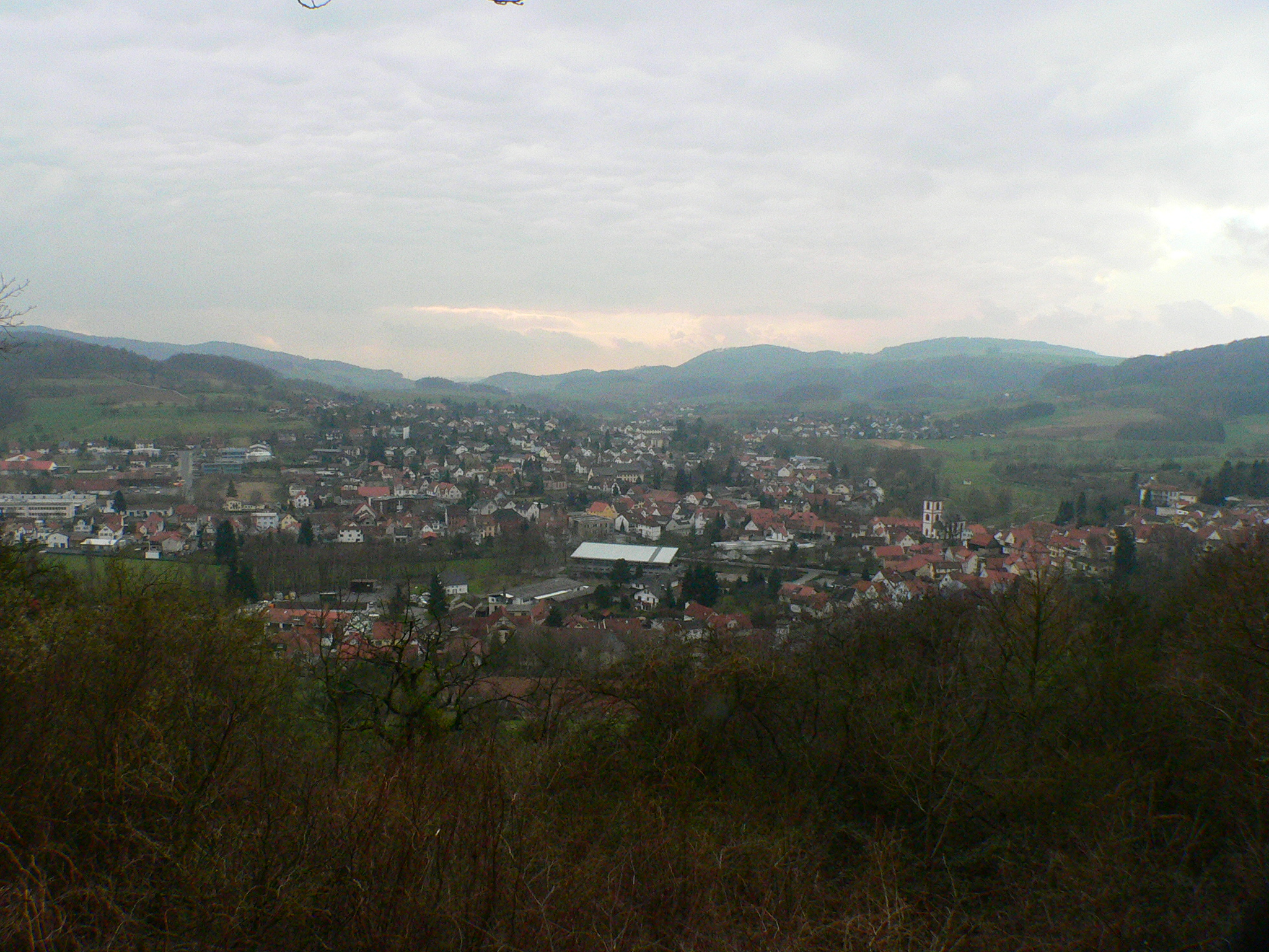 Ortsansicht von Reichelsheim, Odenwald, Hessen. Blick vom Reichenberg nach Südwesten auf Reichelsheim und das obere Gesprenztal zum Gumpener Kreuz.